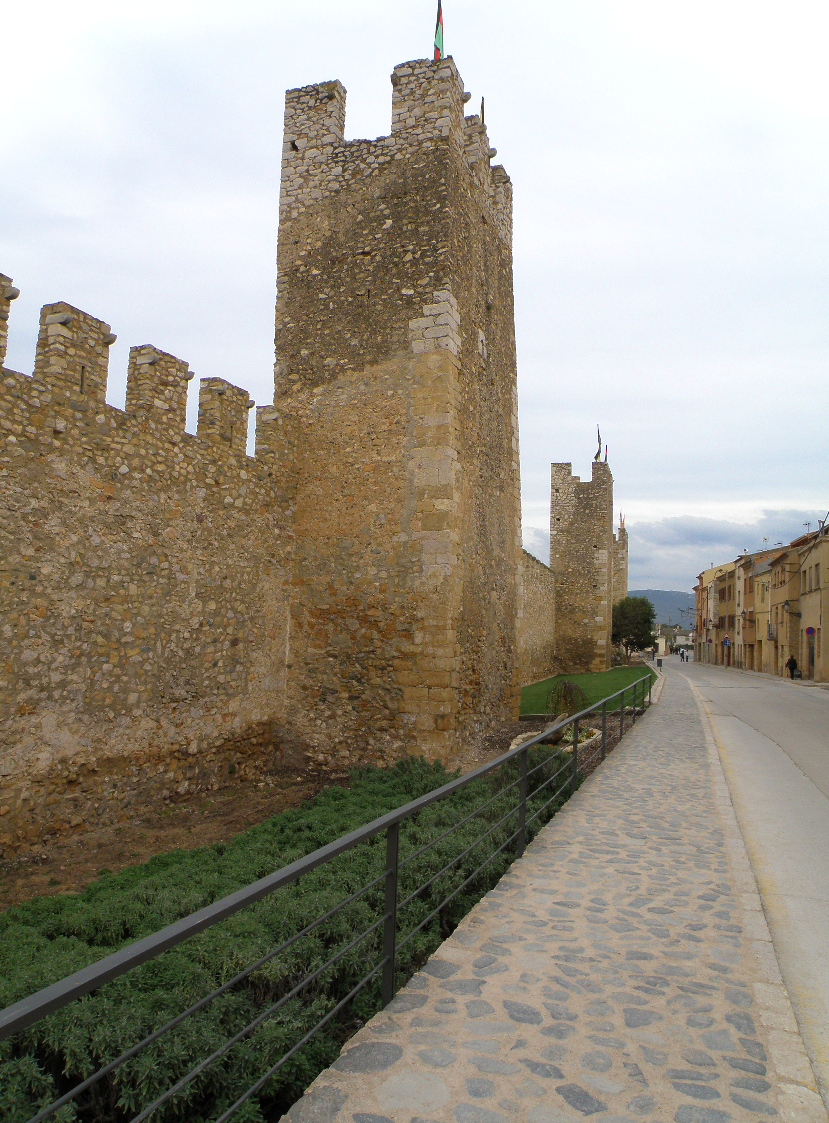 Muralla Medieval de Montblanc